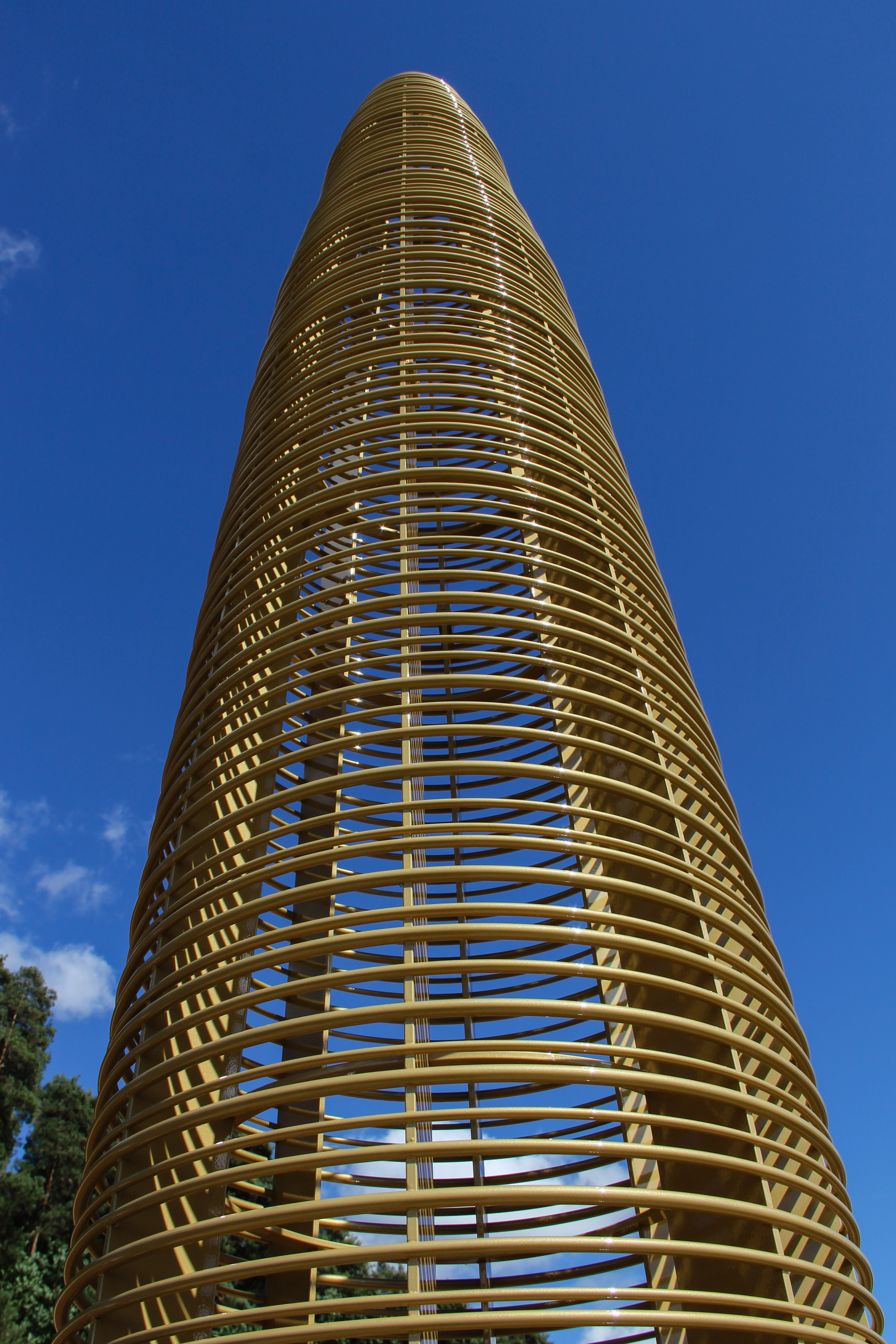 Goldkegelplatz, Infotafel